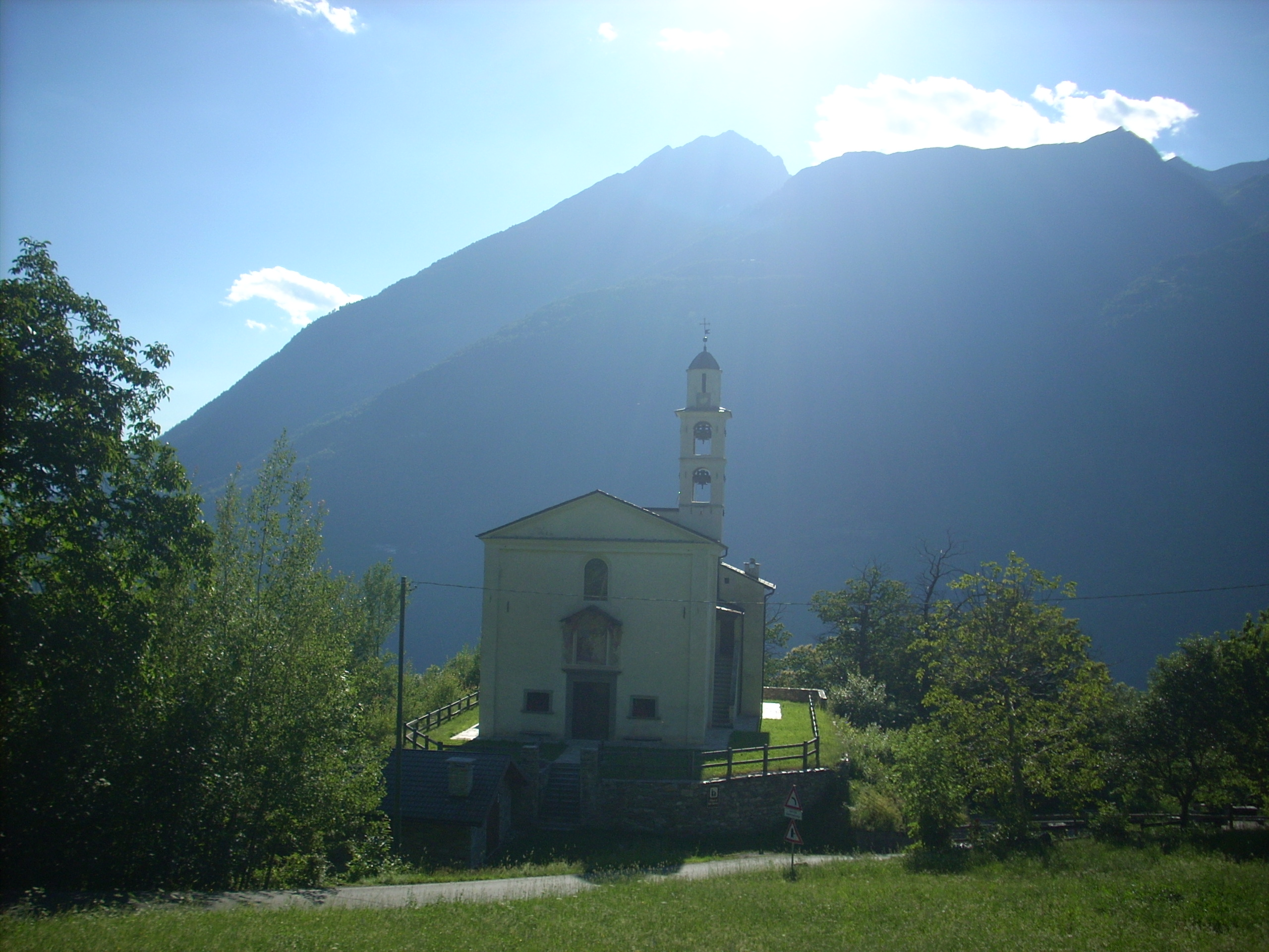 chiesa di SAN MATTEO